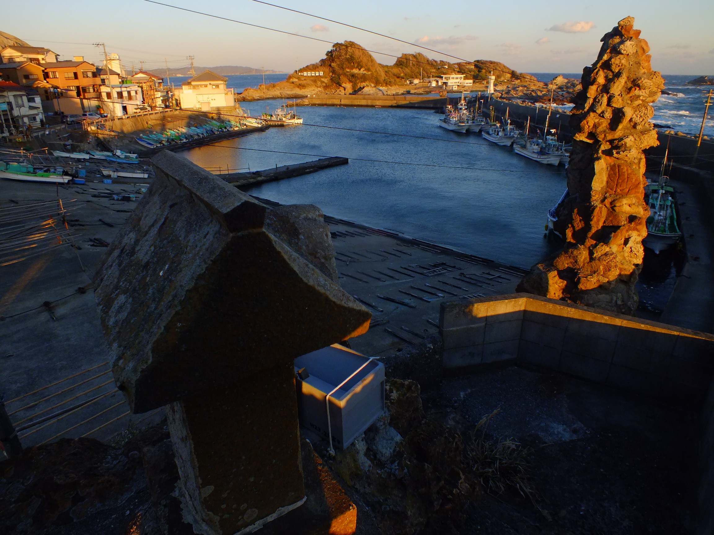 Futomihama,Kamogawa,Chiba 千葉県鴨川市太海浜